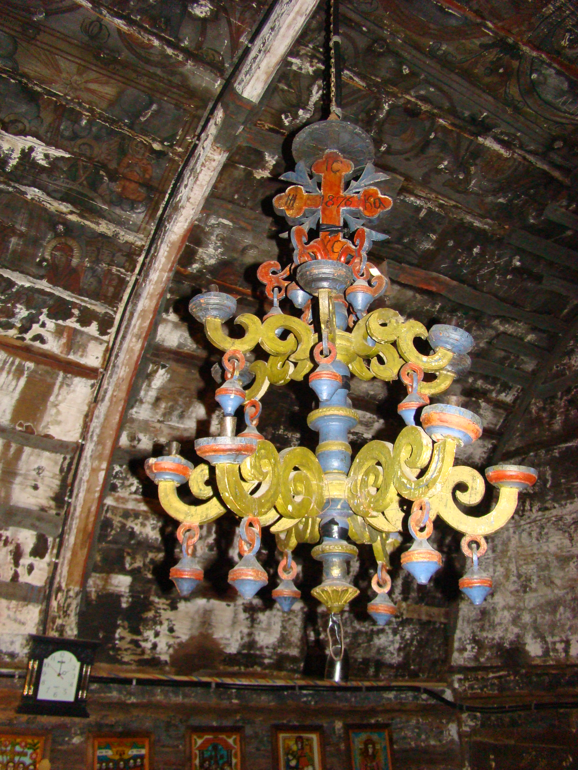 Biserica de lemn "Adormirea Maicii Domnului" a mănăstirii Bic, strămutată din satul Stâna